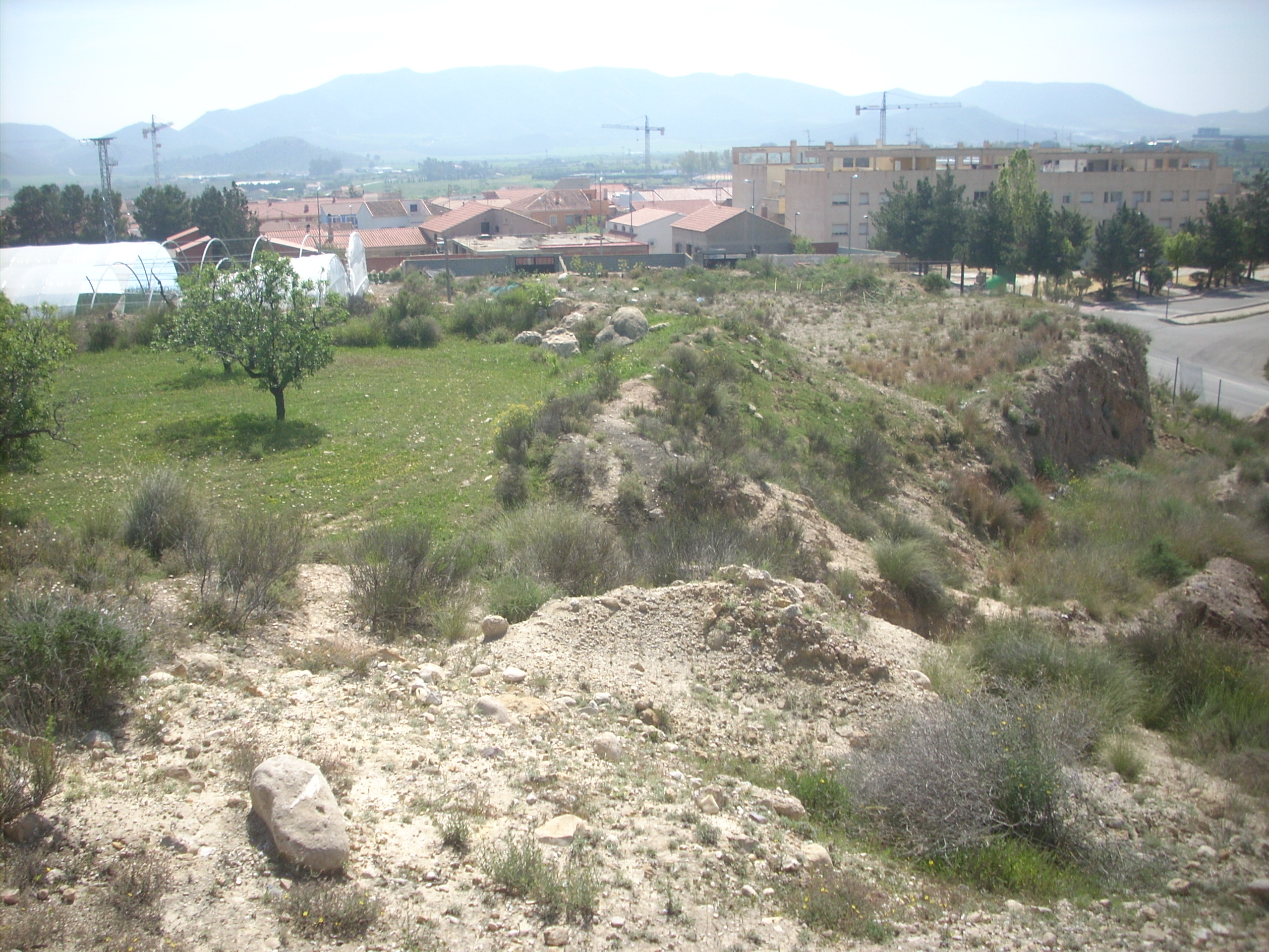 Vista general del yacimiento arqueológico Loma del Tío Ginés, en el fondo la localidad de Puerto Lumbreras